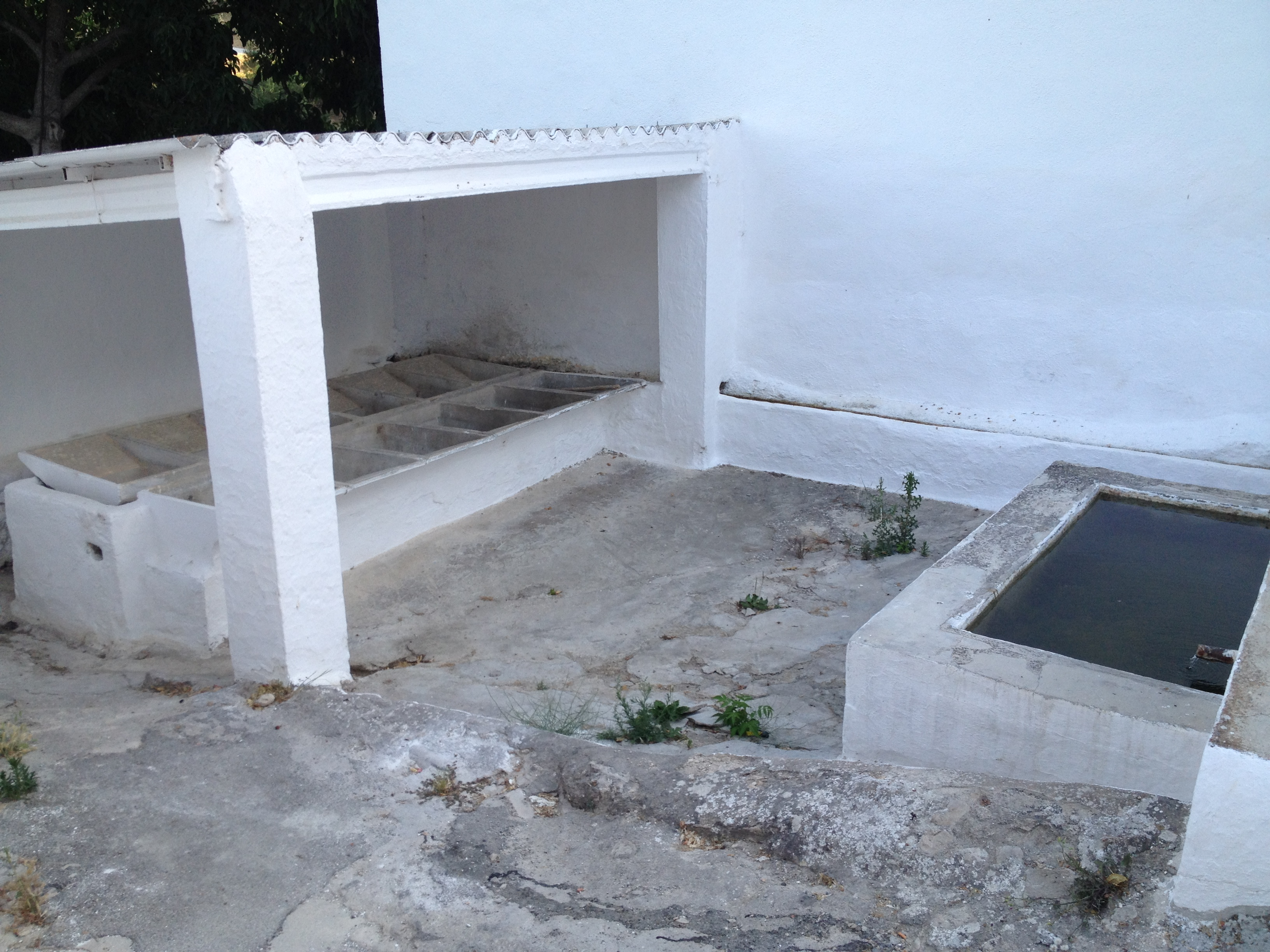 Fotografía del antiguo lavadero público de Venta de Agramaderos.